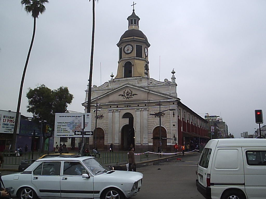 Recoleta Franciscana Autor:Alstradiaan Alstradiaan Blog Fecha:Mayo de 2005 Fotografía tomada con una cámara digital Olympus camedia D-395 de 3.2 megapixeles